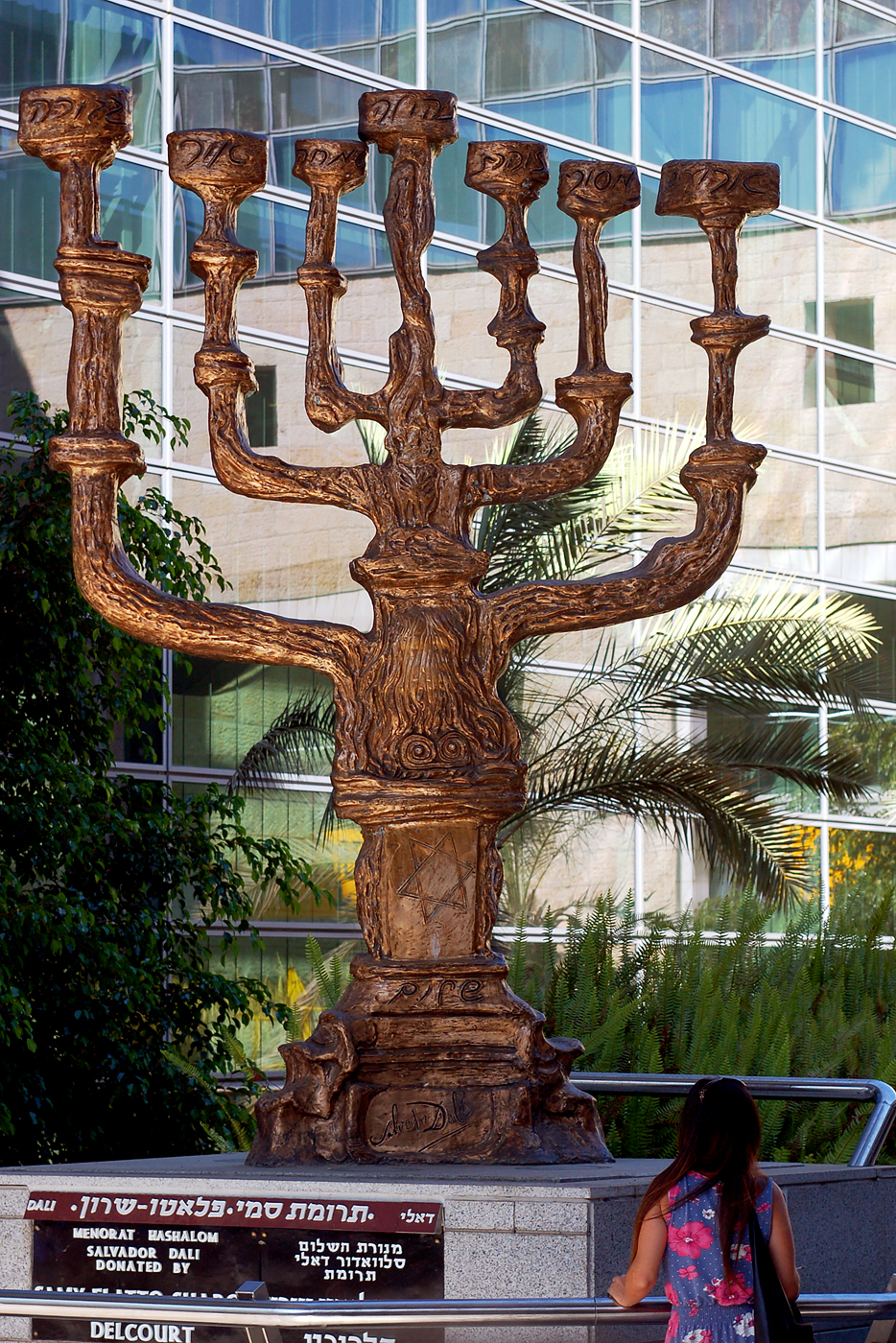 see title